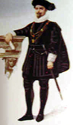 Cameriere segreti di spada e cappa, uniform